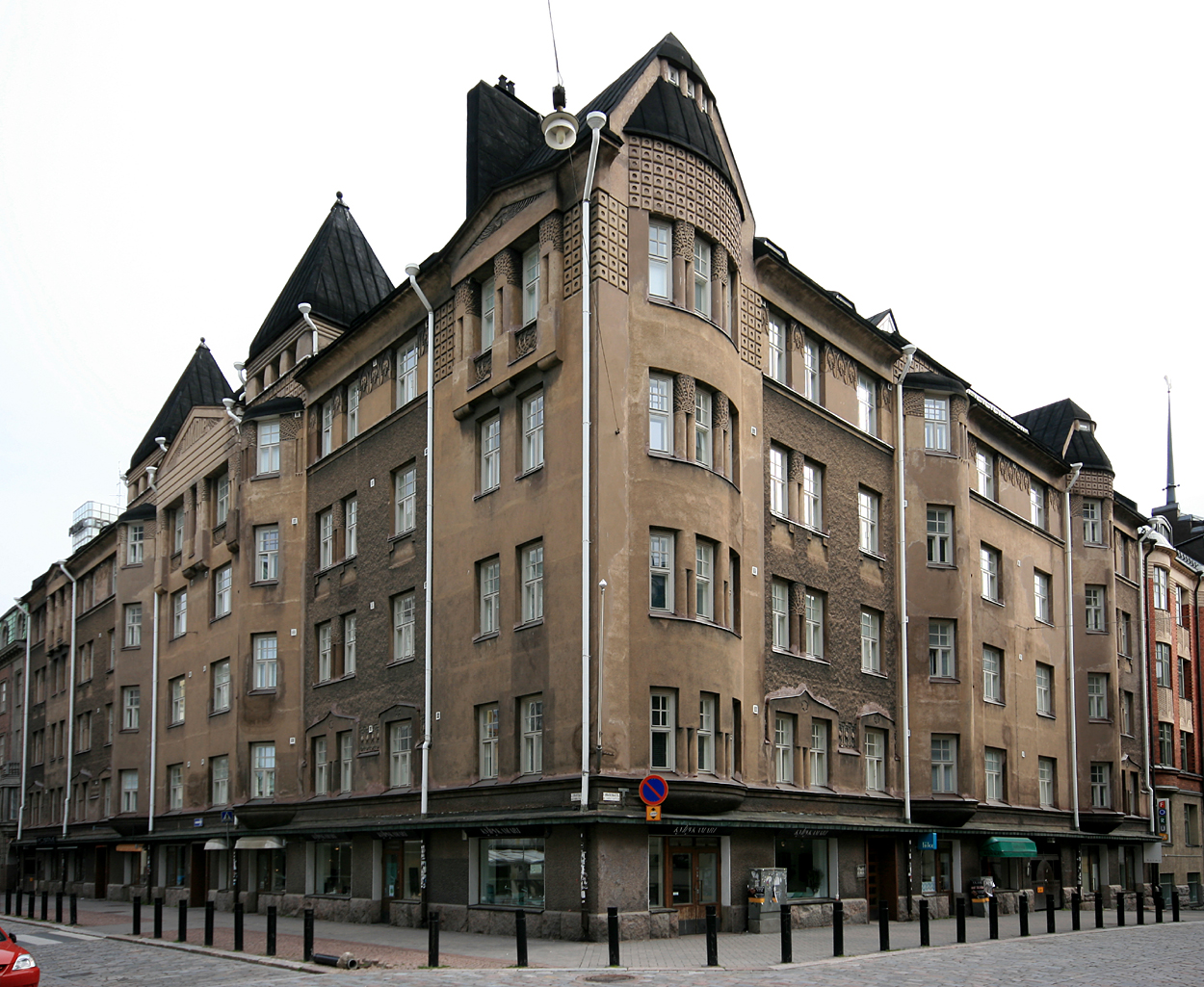 Yrjönkatu 25, Helsinki. Arkkitehti: Heikki Kaartinen. Rakennusvuosi: 1906.